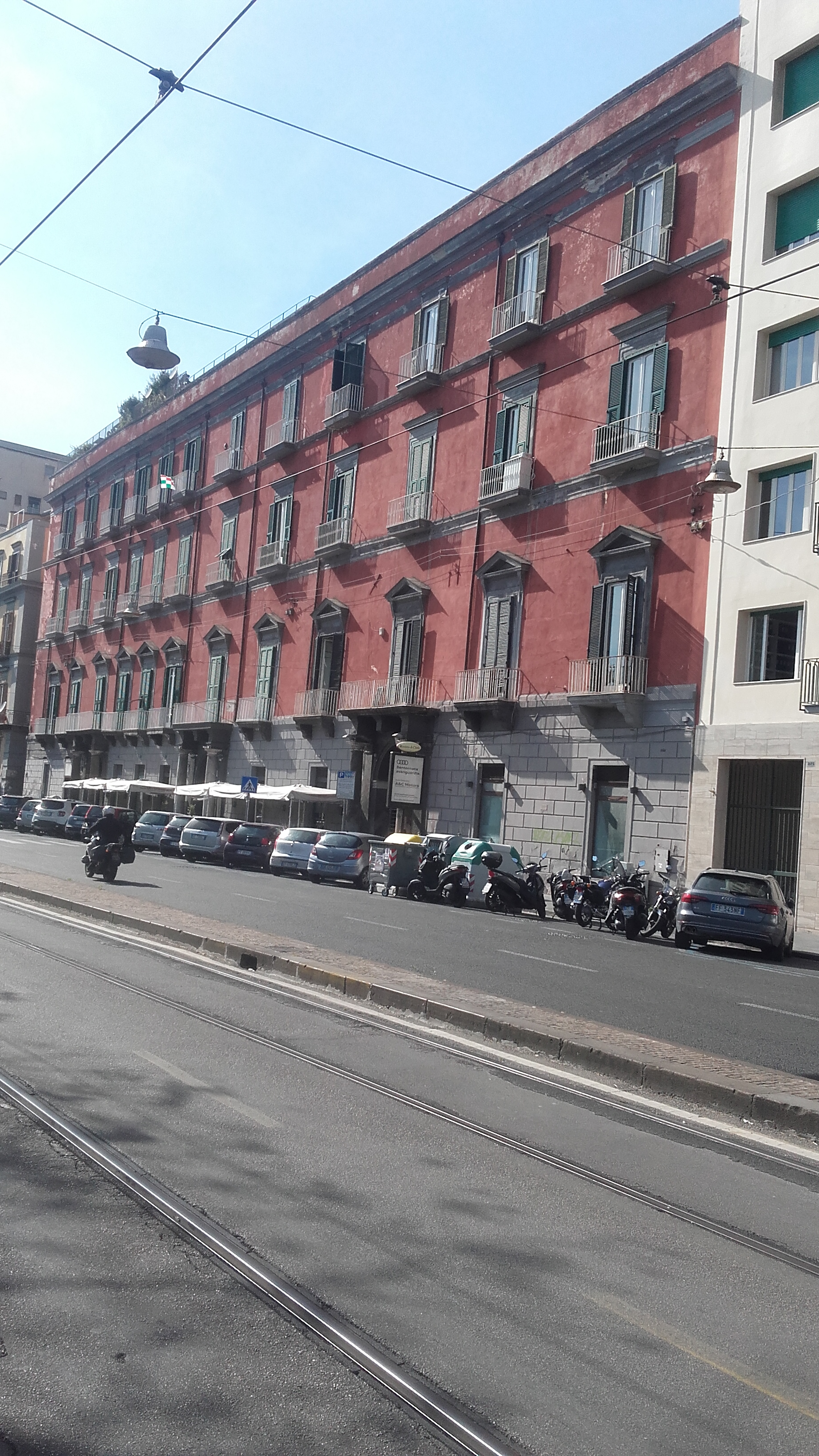 Prestigioso edificio del XVII secolo, a lungo dimora dei Pinto Freitas de Mendoza, principi di Ischitella.